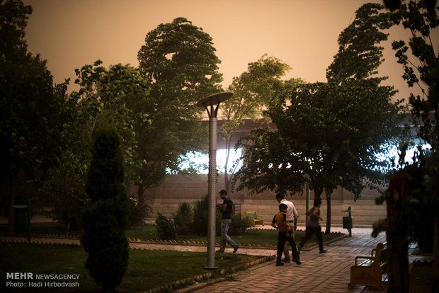 هوای غبار گرفته در تهران در زمان طوفان۱۳۹۴